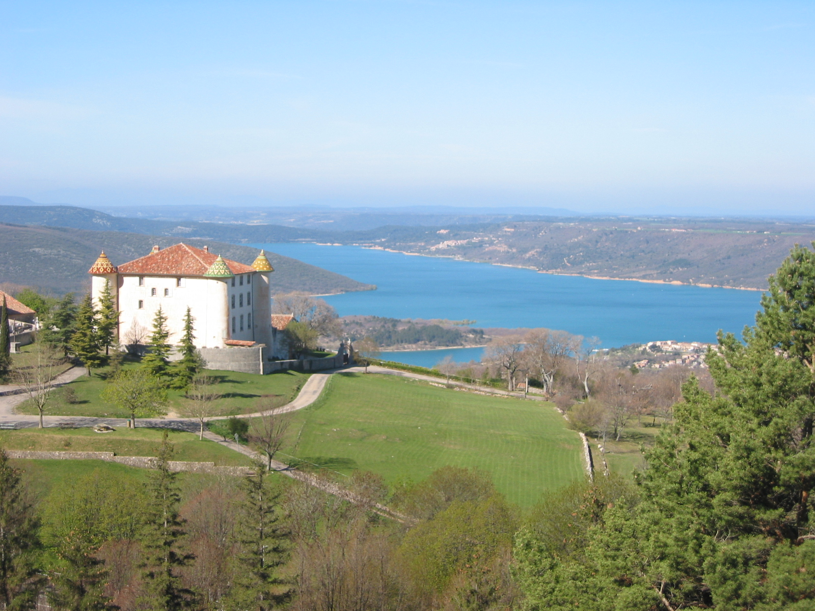 Lac de Sainte-Croix, Alpes de Haute Provence, France Au premier plan, le château d'Aiguines Photo prise le 16 avril 2006 Aut : Jddmano